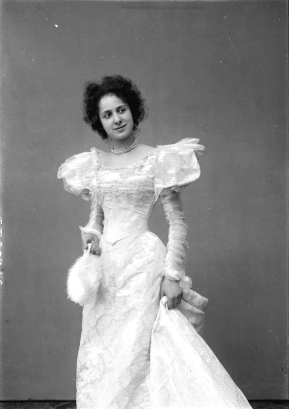 Ines Cristina Zacconi